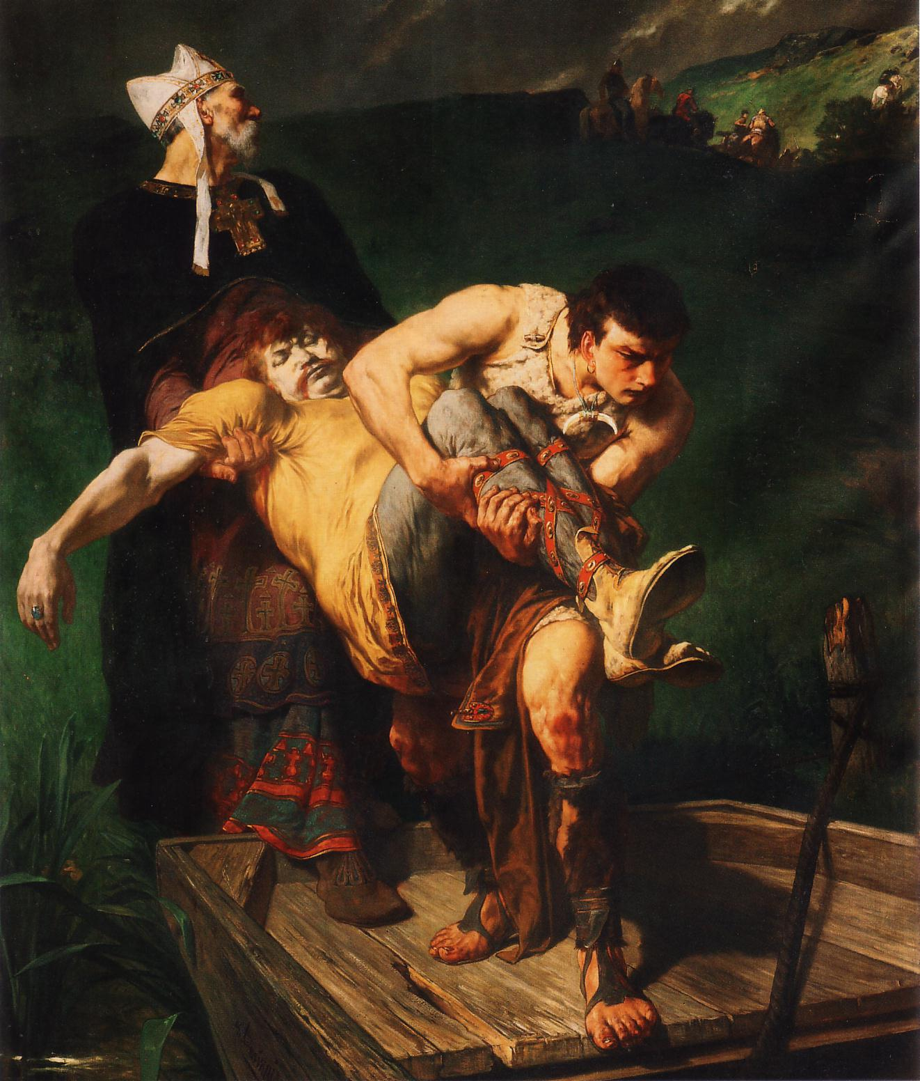 Mort de Chilpéric